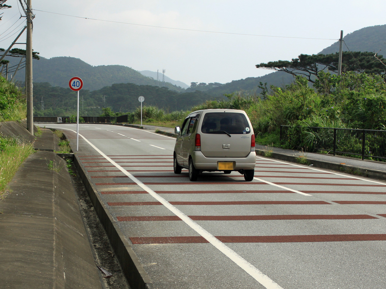 Zebra zone at Iriomote Island, Okinawa, Japan（西表島のゼブラゾーンと片勾配側溝）